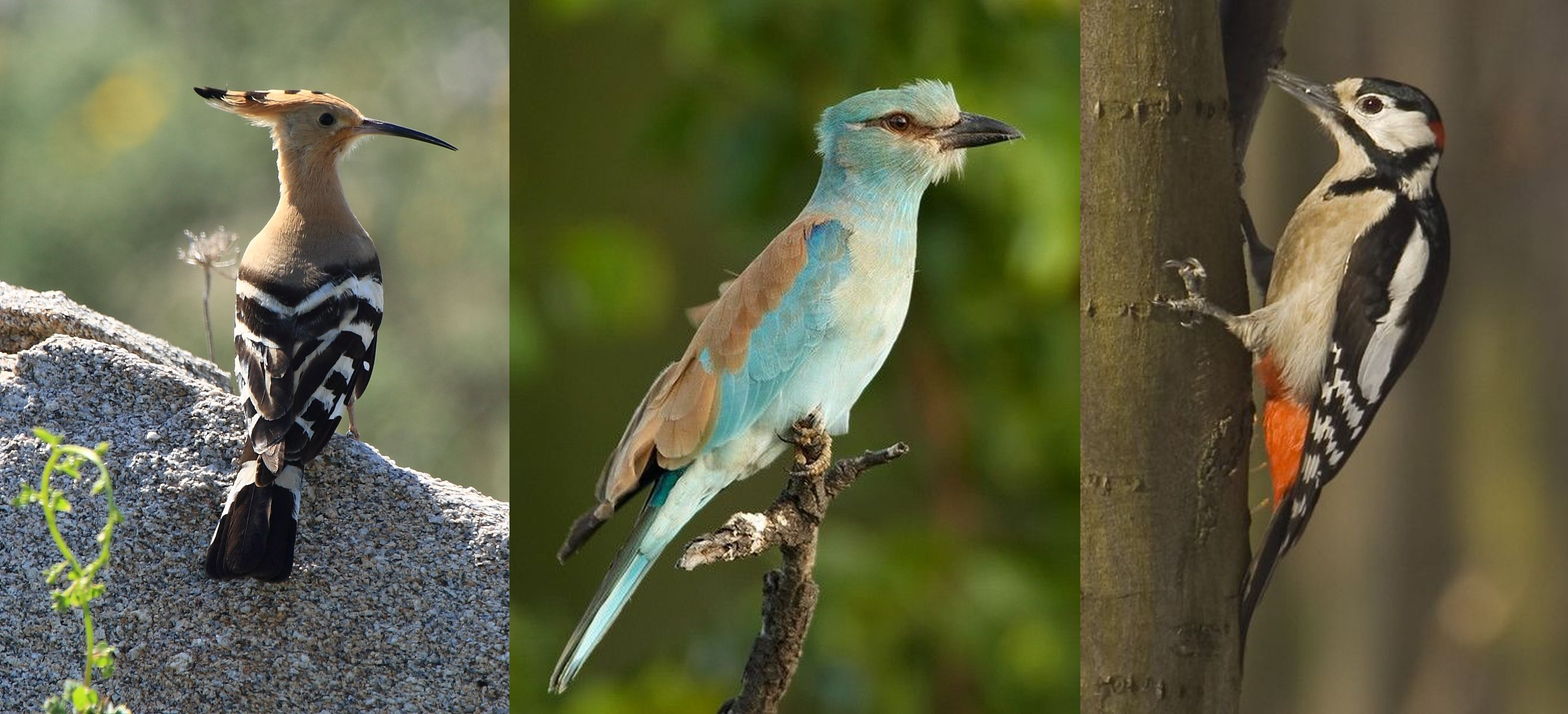 Picocoraciae